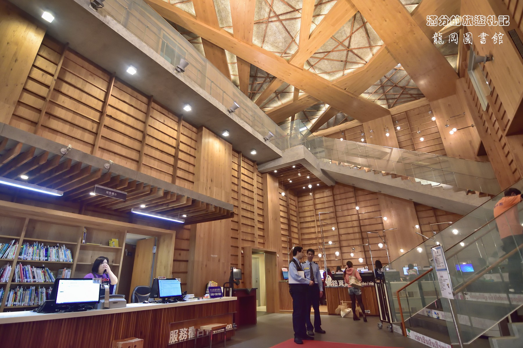 桃園-龍岡圖書館